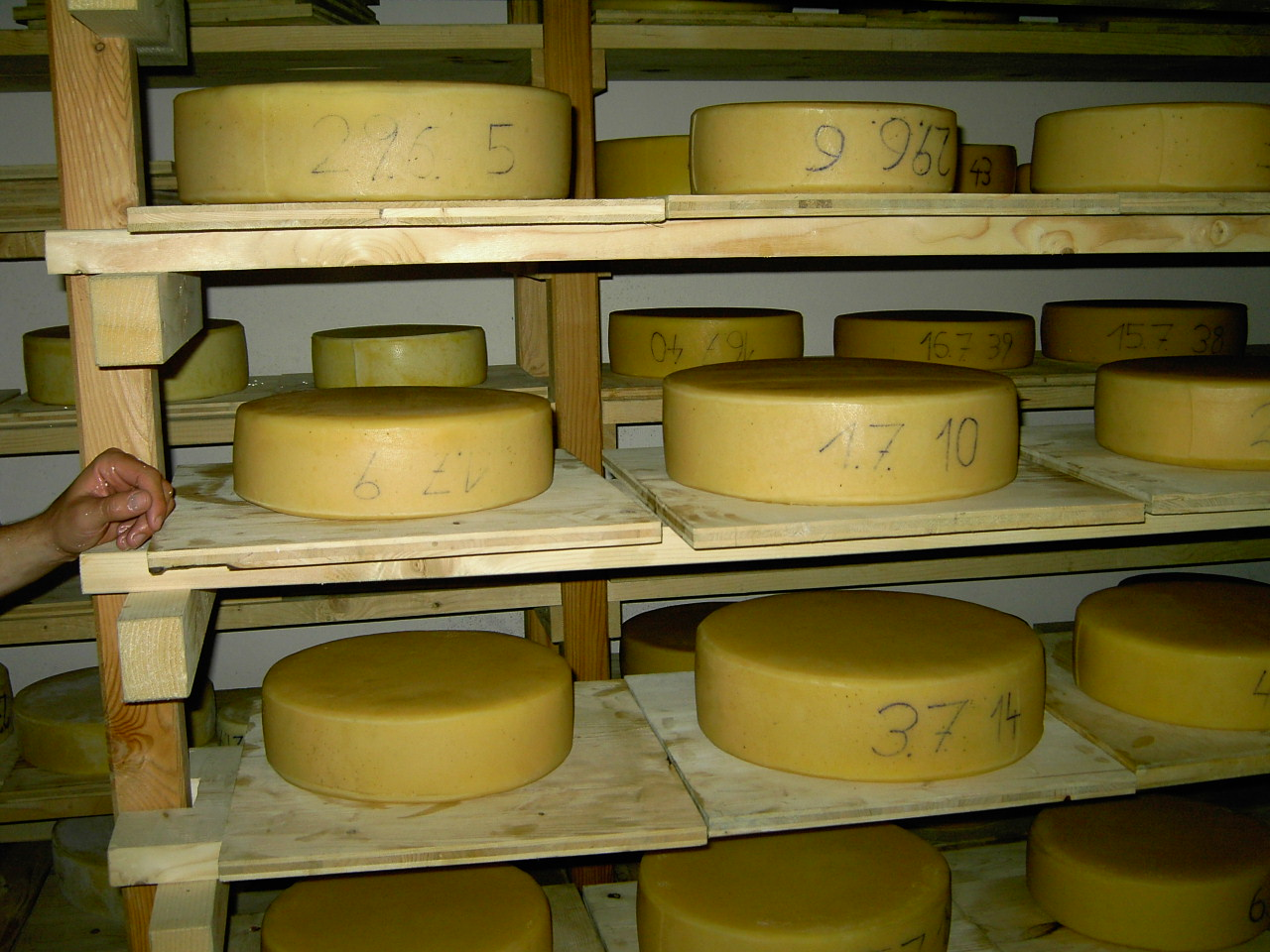 Gailtaler Almkäse g.U. von der Frondell Alm im Lager